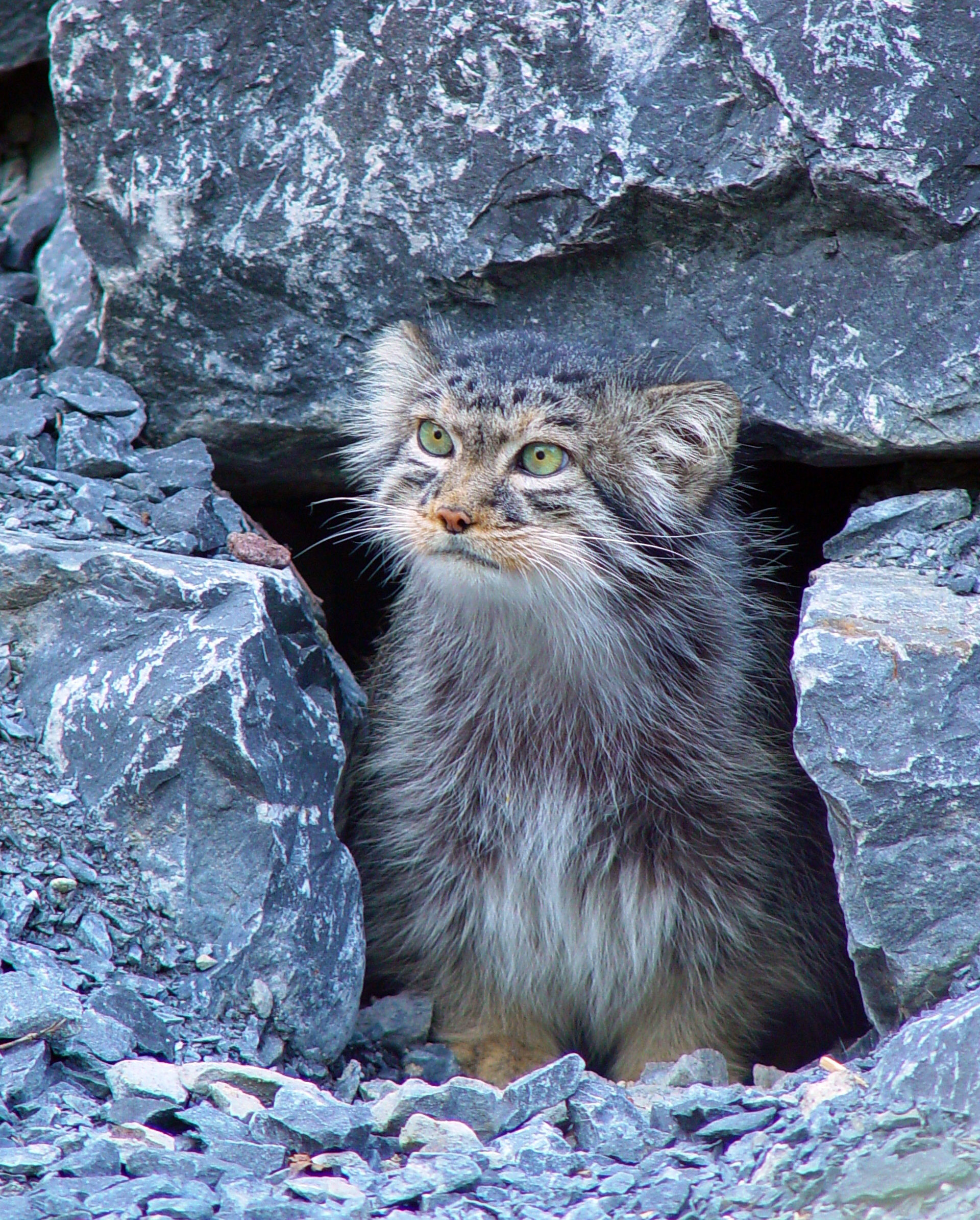 Manul (Otocolobus manul) in Zoo Zürich